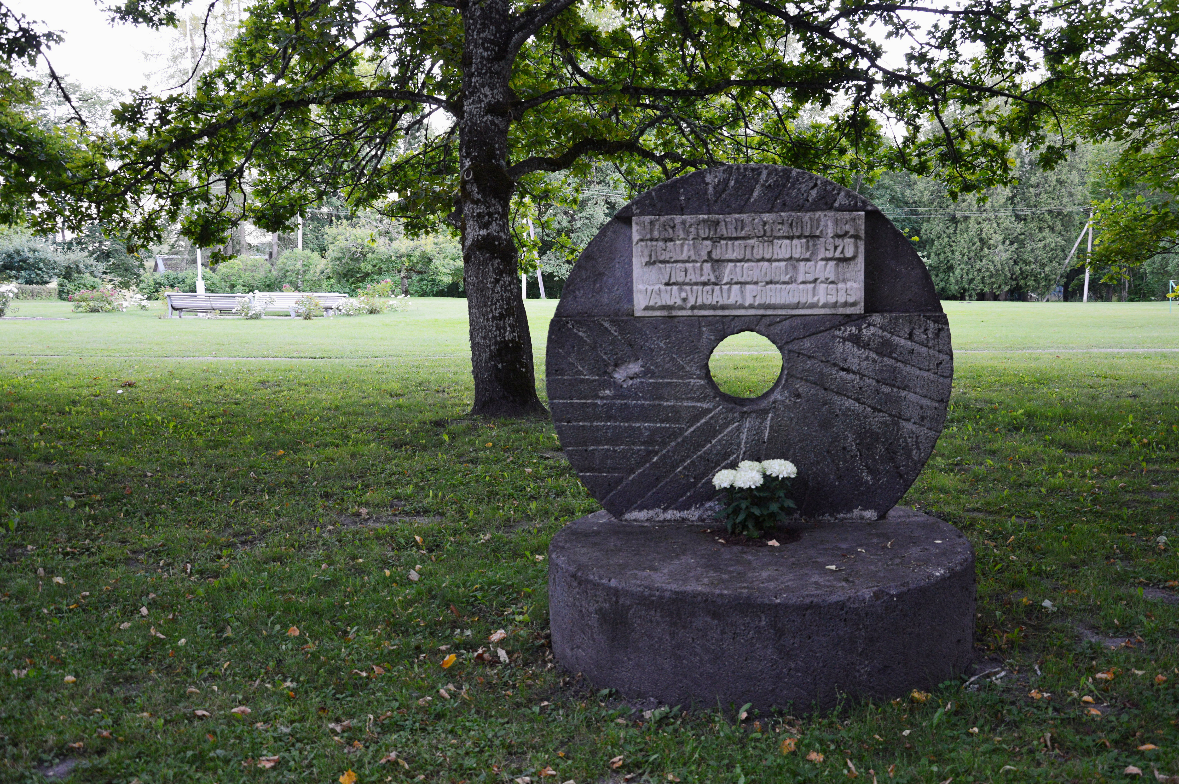 Mälestuskivi Vana-Vigalas